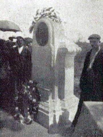 Monument à la mémoire d'Henri Béconnais, inauguré le 2 juillet 1906.